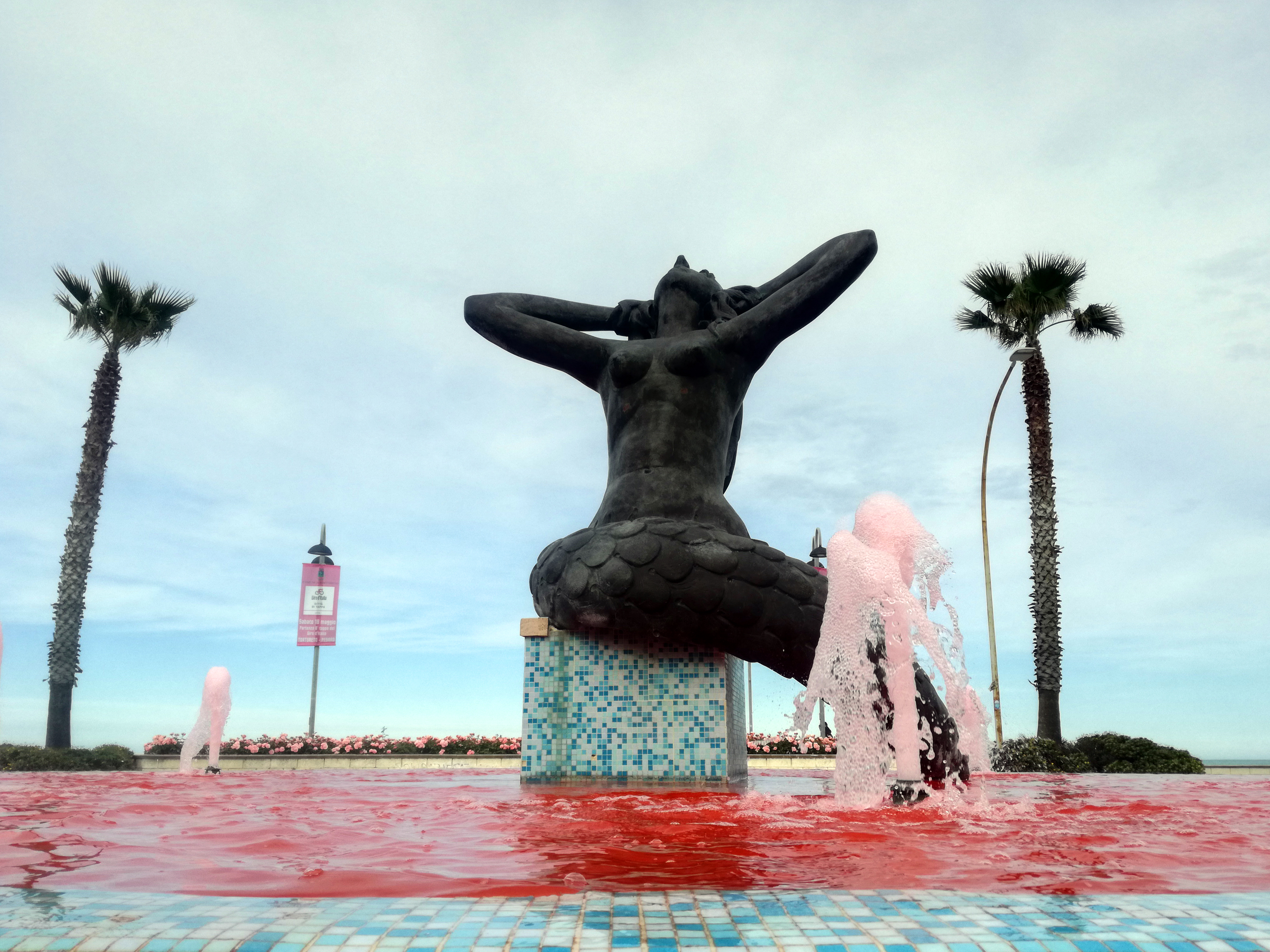 Fontana della sirena di Tortoreto decorata in rosa (17-5-2019), in occasione della tappa del 18 maggio del Giro d'Italia 2019. This is a photo of a monument which is part of cultural heritage of Italy.